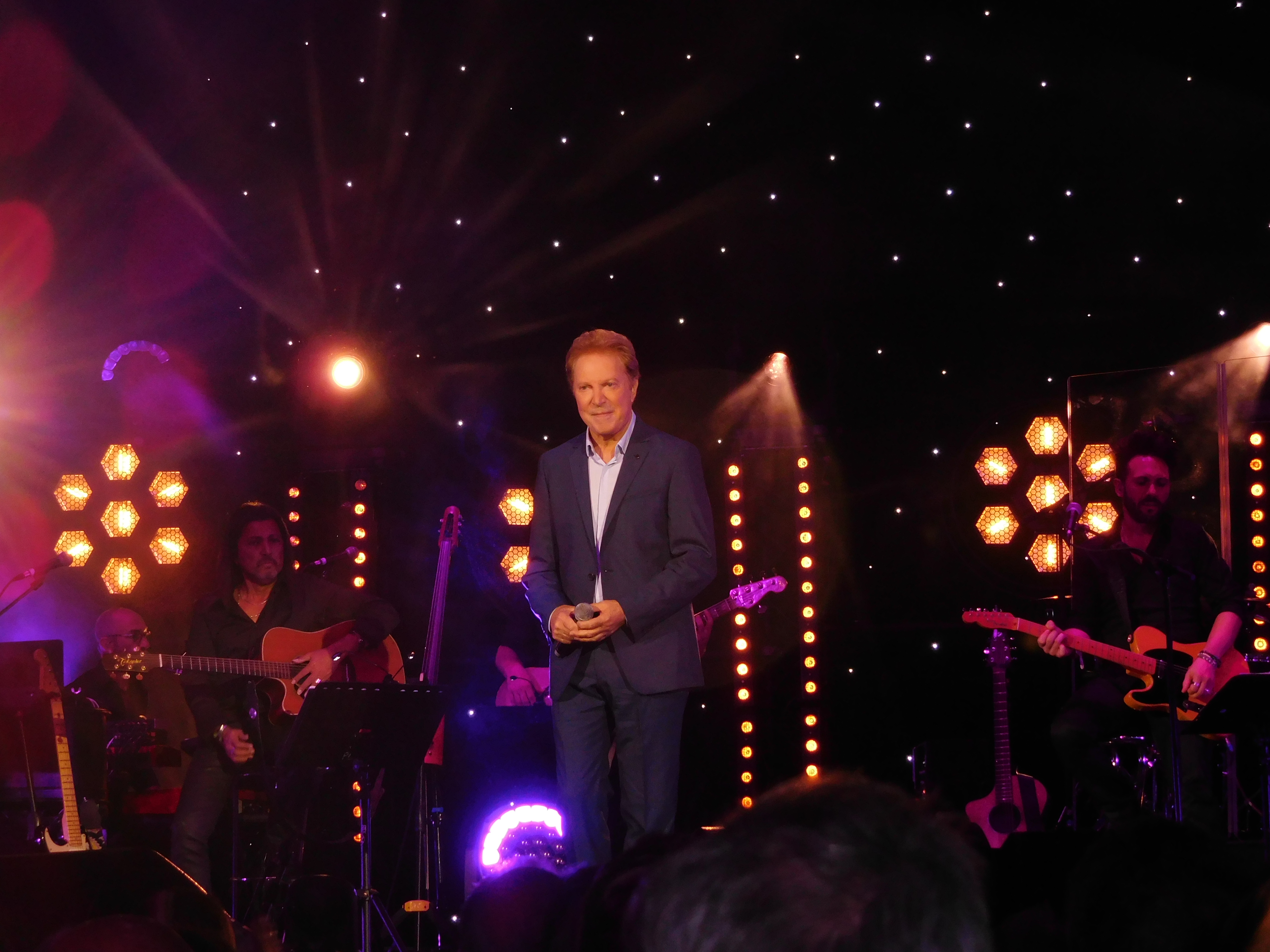 Jean-Jacques Lafon sur la croisière Age Tendre 2017